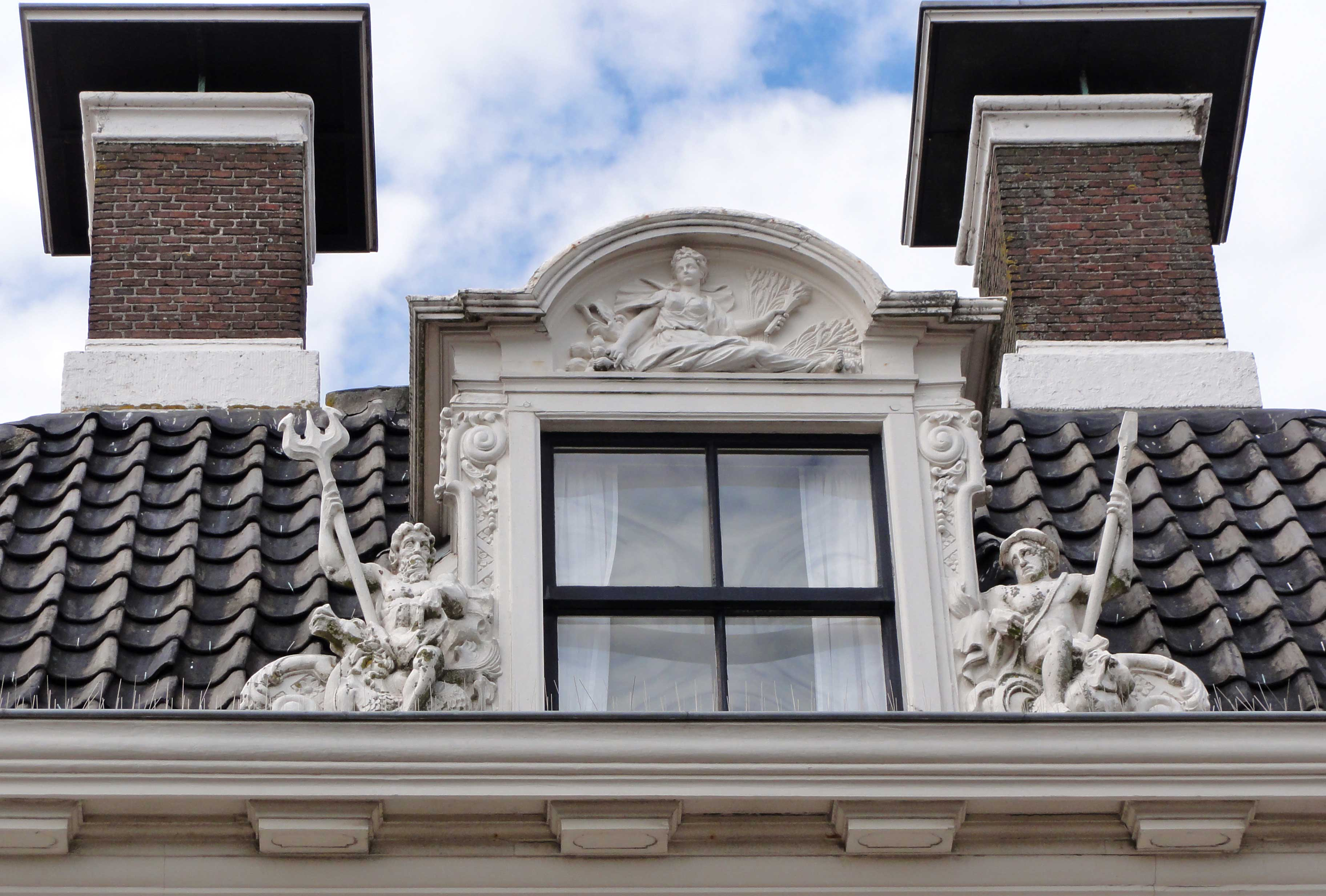 Geveldetail van het pand Noorderhaven 33